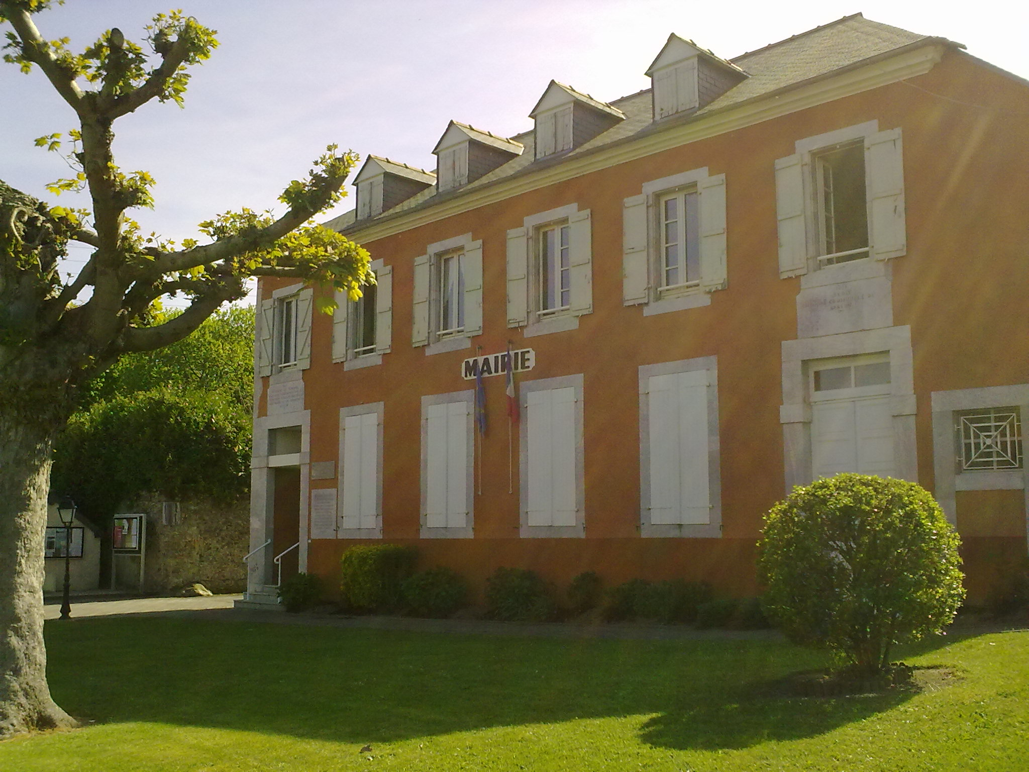 Barzun, France